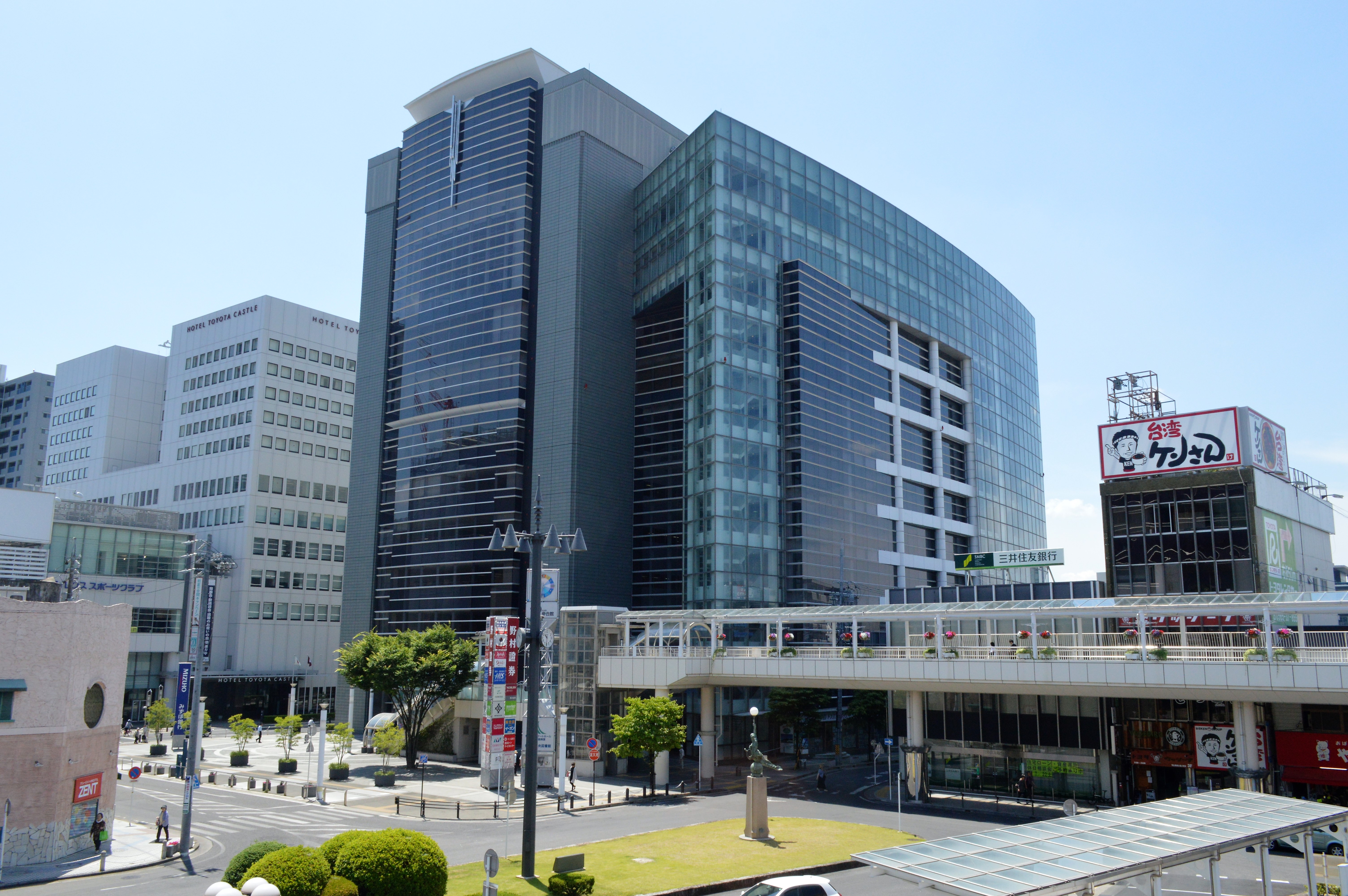 愛知県豊田市西町にあるとよた参合館。